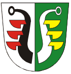 Znak města Choryně